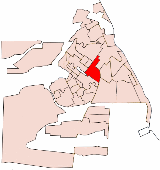 Barrio San Martín